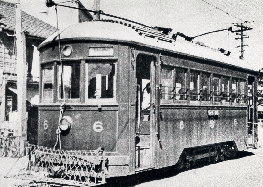 築地電軌（株）6-7を買収した木造低床単車で、会社時代は写真のように前後にポールが付いていた。